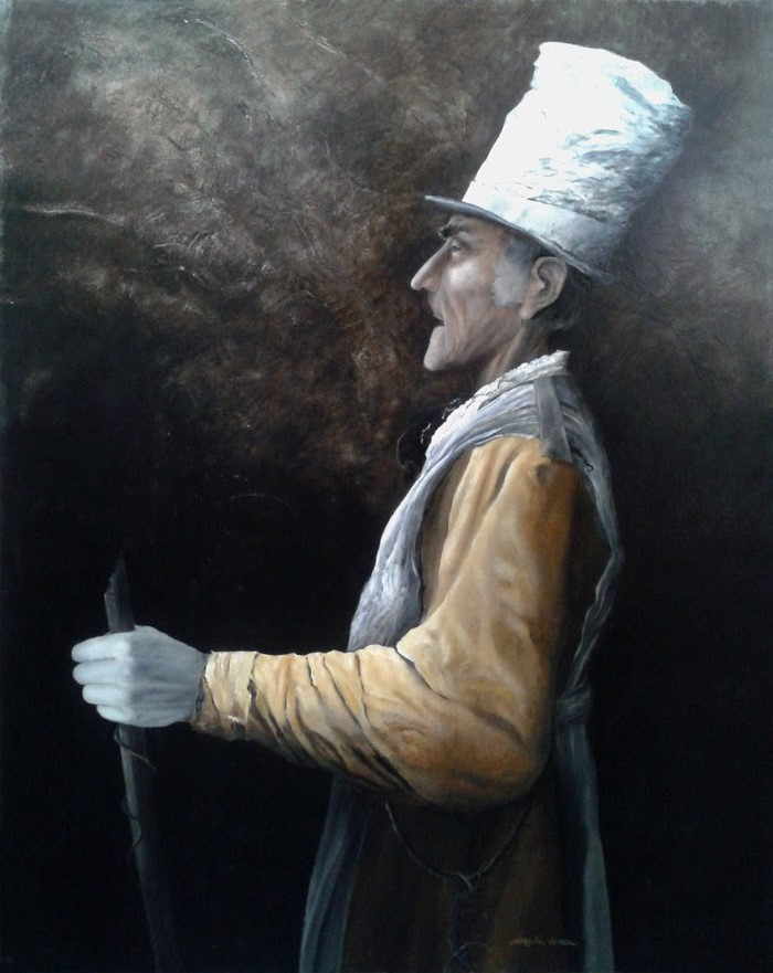 S.T. Óleo - tabla, 75 x 50 cm. Marcial Gómez 1976